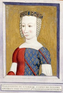 Marguerite de Bourbon (1344-1416)